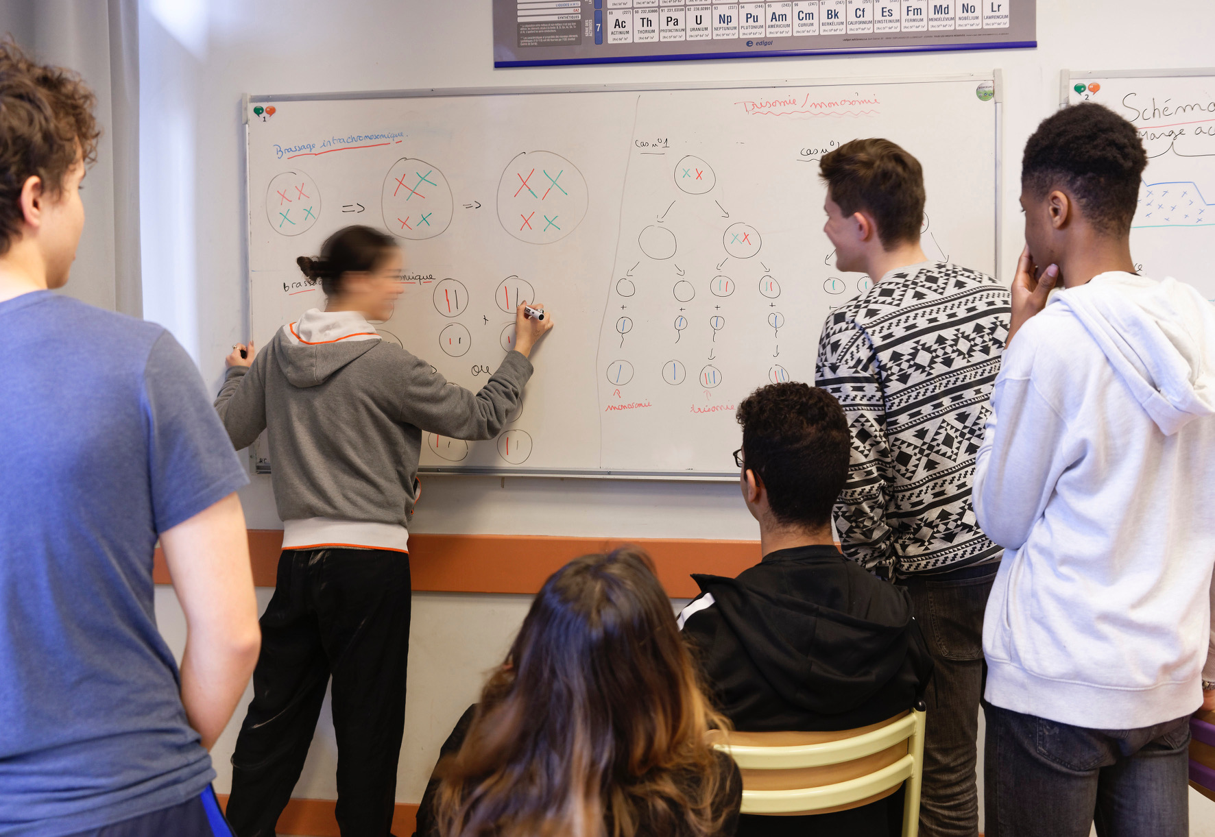 Une élève explique une notion de cours à ses camarades sur l'un des tableaux de la salle de classe.